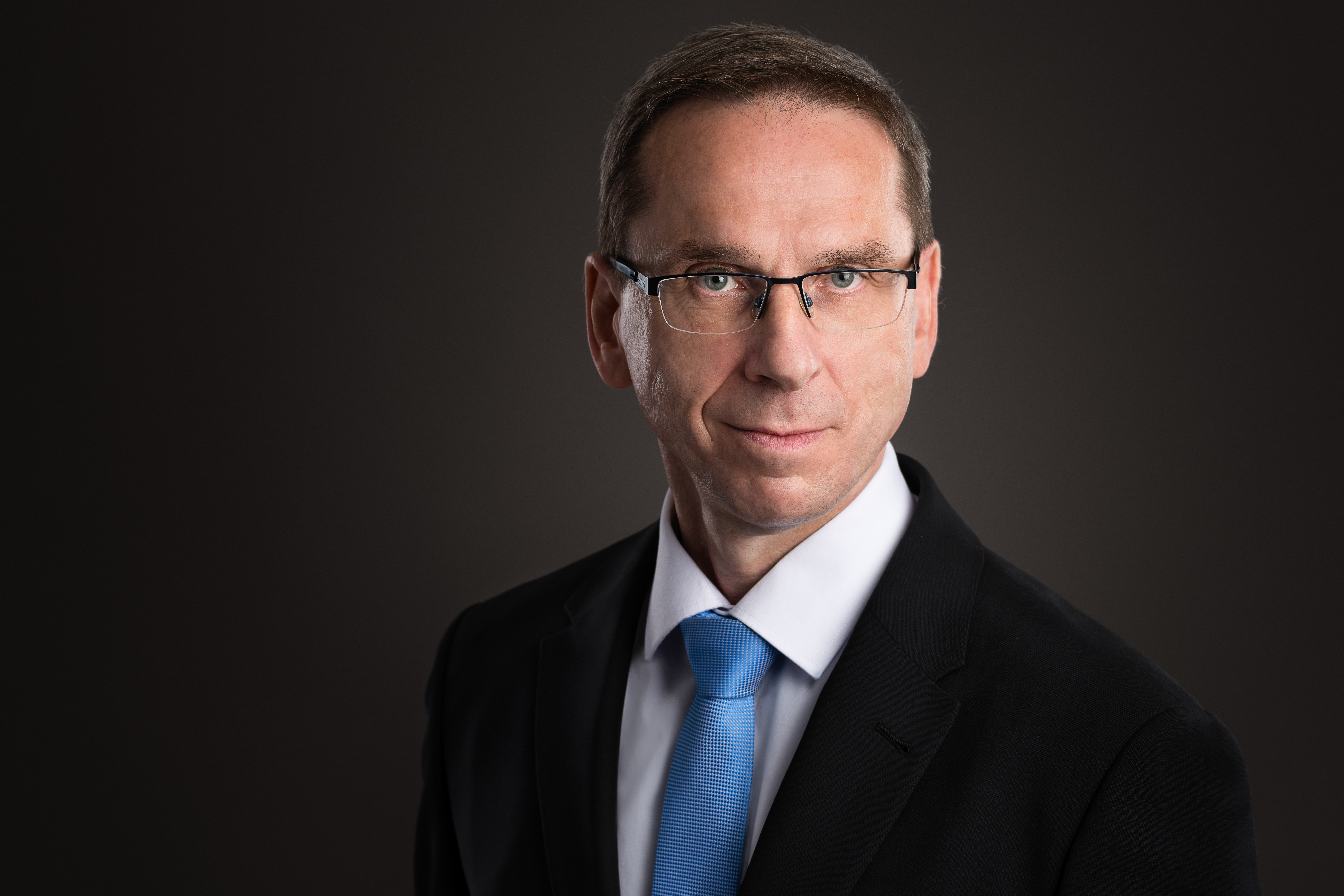 Ladislav Janíček (2020)